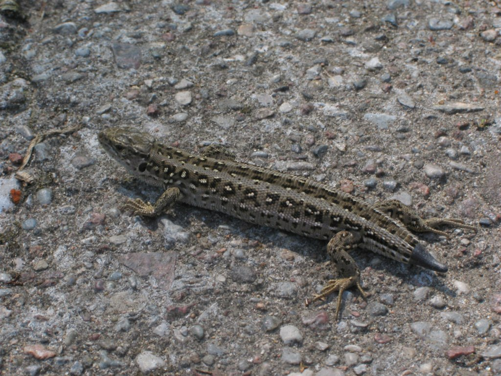 Jaszczurka zwinka (Lacerta agilis) w trakcie regeneracji ogona